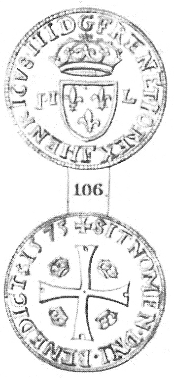 Douzain_1575_Henryk_Walezy.jpg